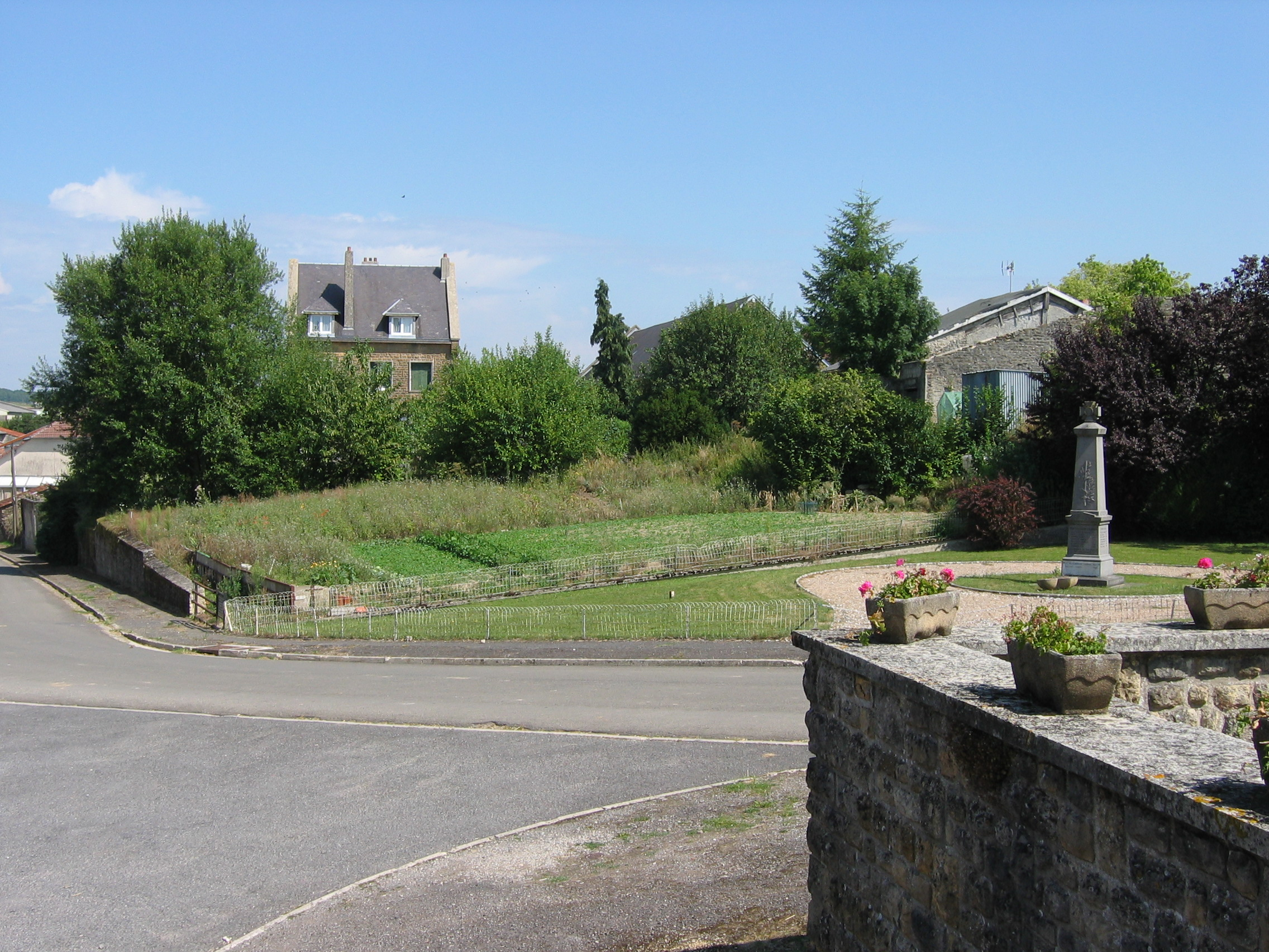 Bayonville vue du monument aux morts en face de l'église